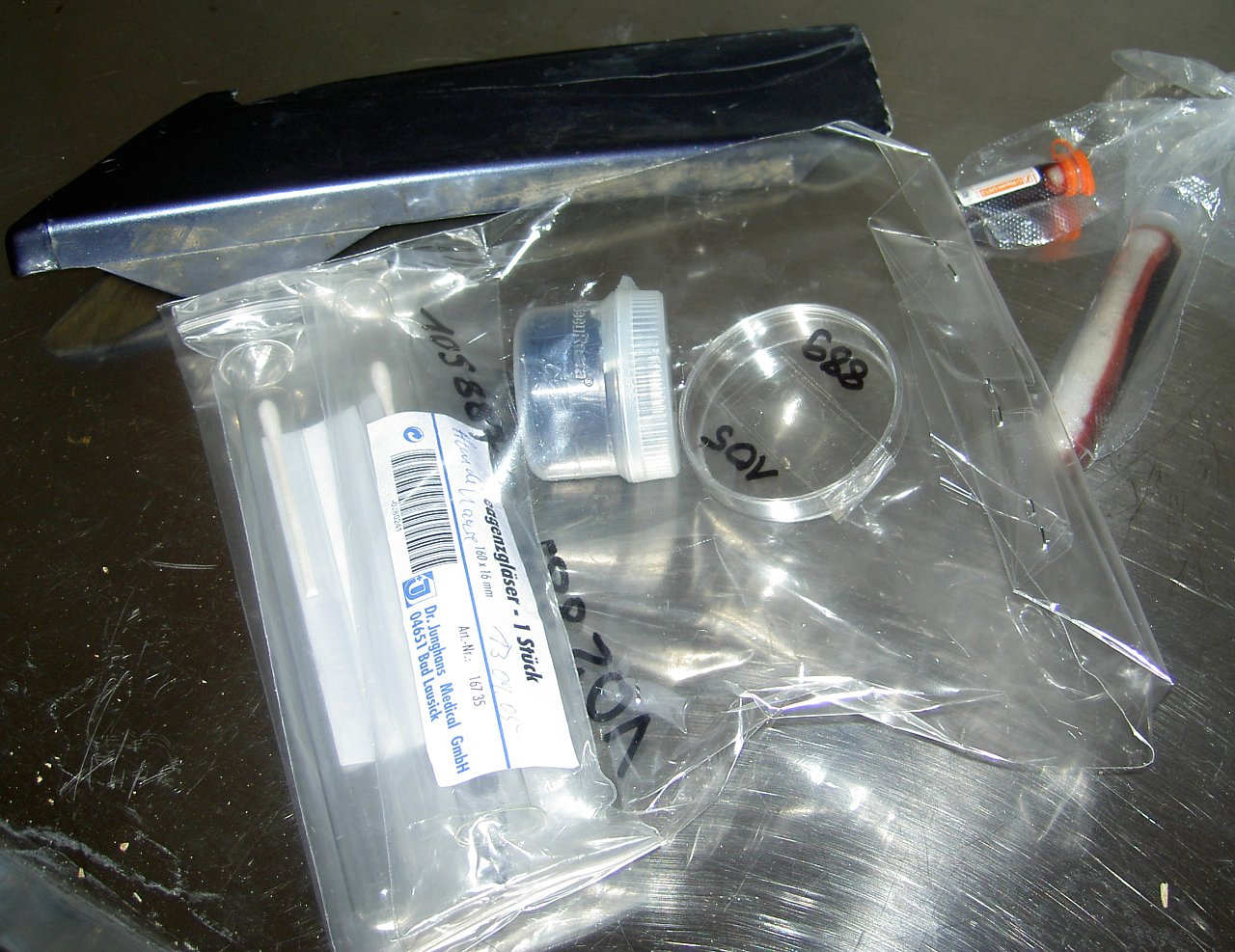 animal forensics: Beweise in einem (abgeschlossenen) deutschen Kriminalfall. Eigene Aufnahme.